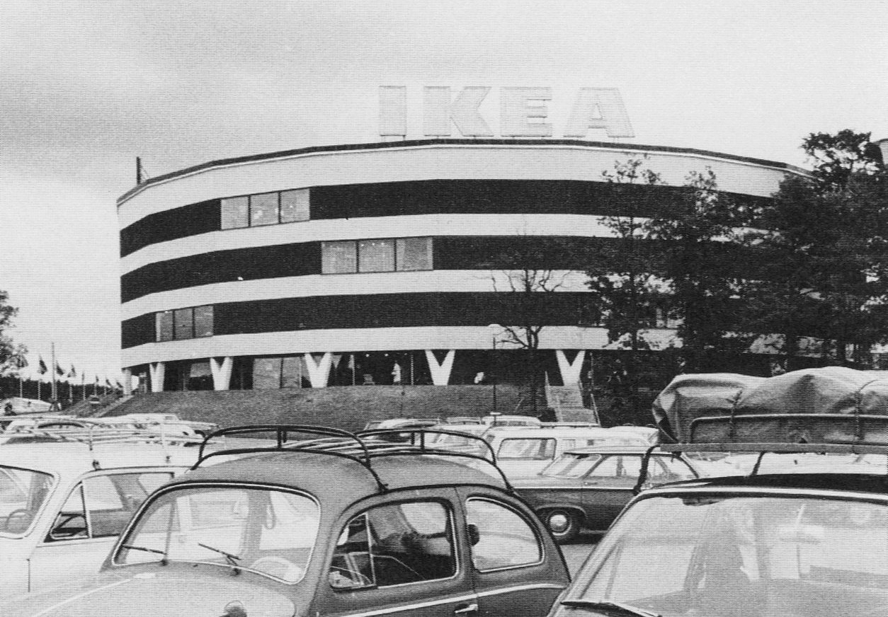 Ett Ikeavaruhus i Kungens kurva i Huddinge kommun.